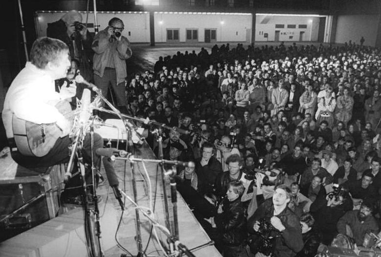 ADN-ZB/Grubitzsch/1.12.89/ Leipzig: Biermann-Konzert/ Der Liedermacher, der nach jahrelangen Auftrittsverboten 1976 während einer BRD-Tournee ausgebürgert worden war, trat zum erstenmal wieder in der DDR auf. In der Messehalle 2 wurde er von den etwa 5.000 Besuchern mit einem Beifallsorkan empfangen.